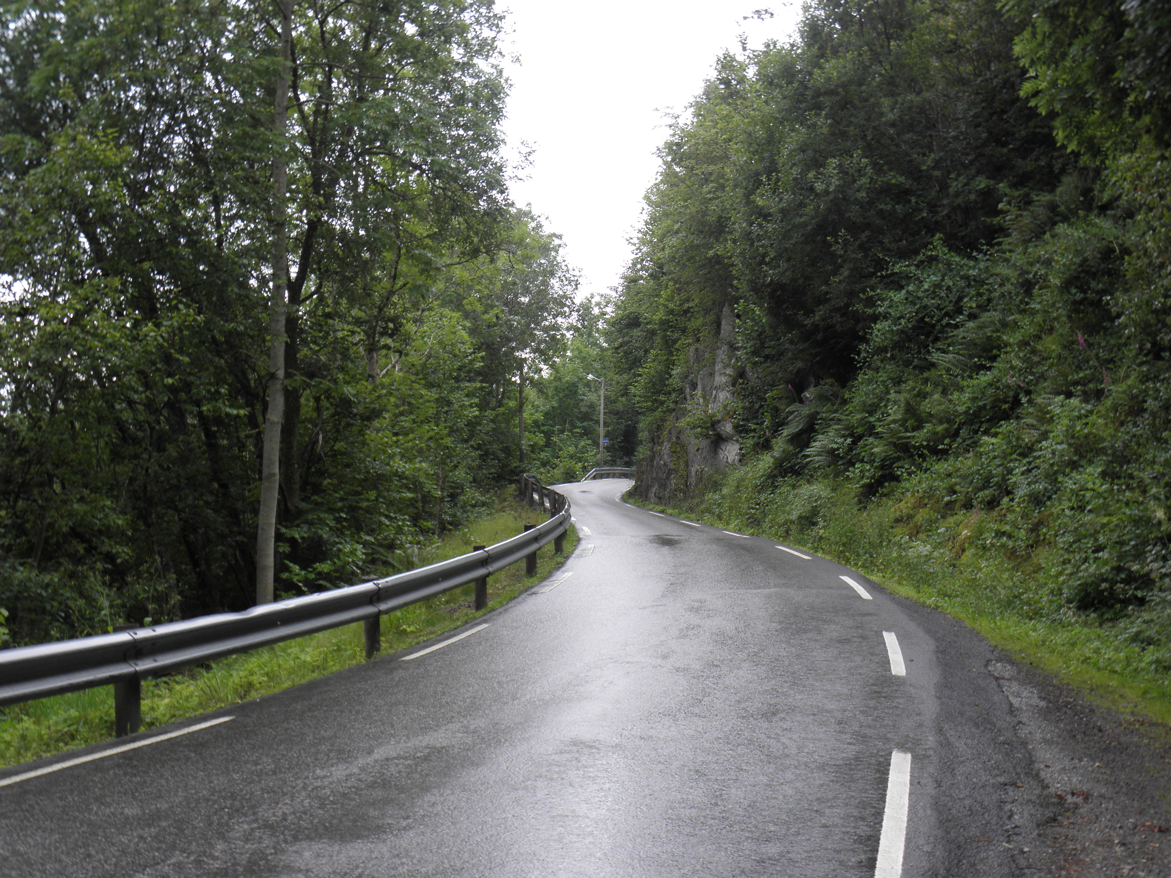 Fylkesveg 82 i Hordaland mot Neshamn, langt inne i Søreidsvågen.